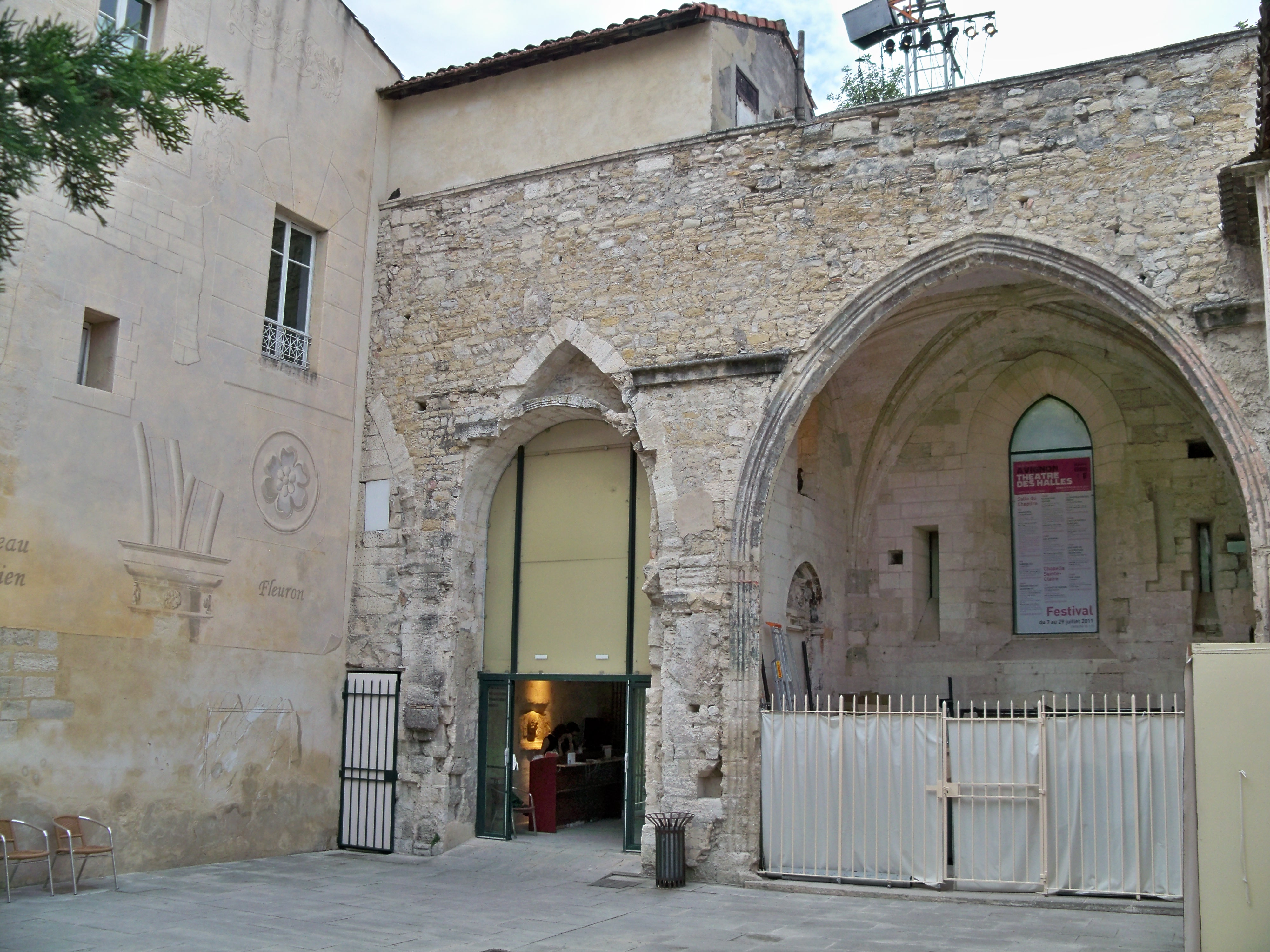 Choeur Sainte Claire (Avignon)